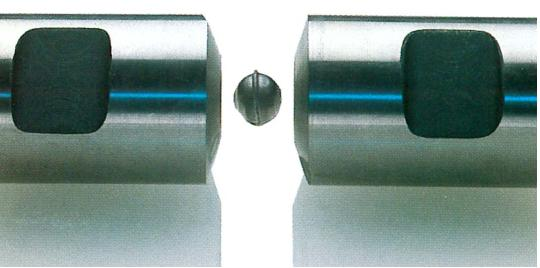 Kugelgeometrie und Pressmatrizen (KGM)